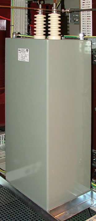 Ukázka poněkud většího kondenzátoru 100 μF na napětí 15000 V